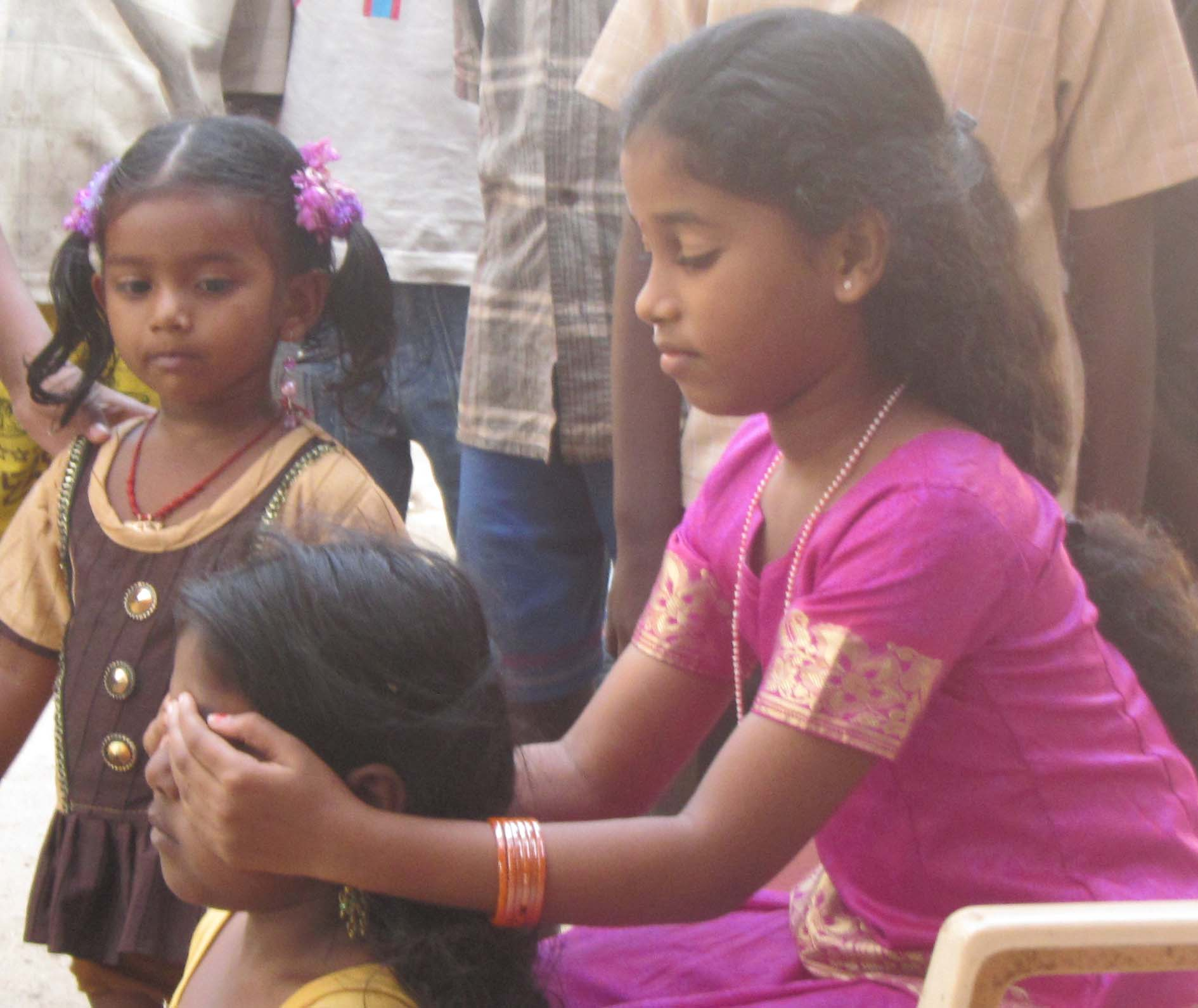 கண்ணாமூச்சி விளையாட்டு